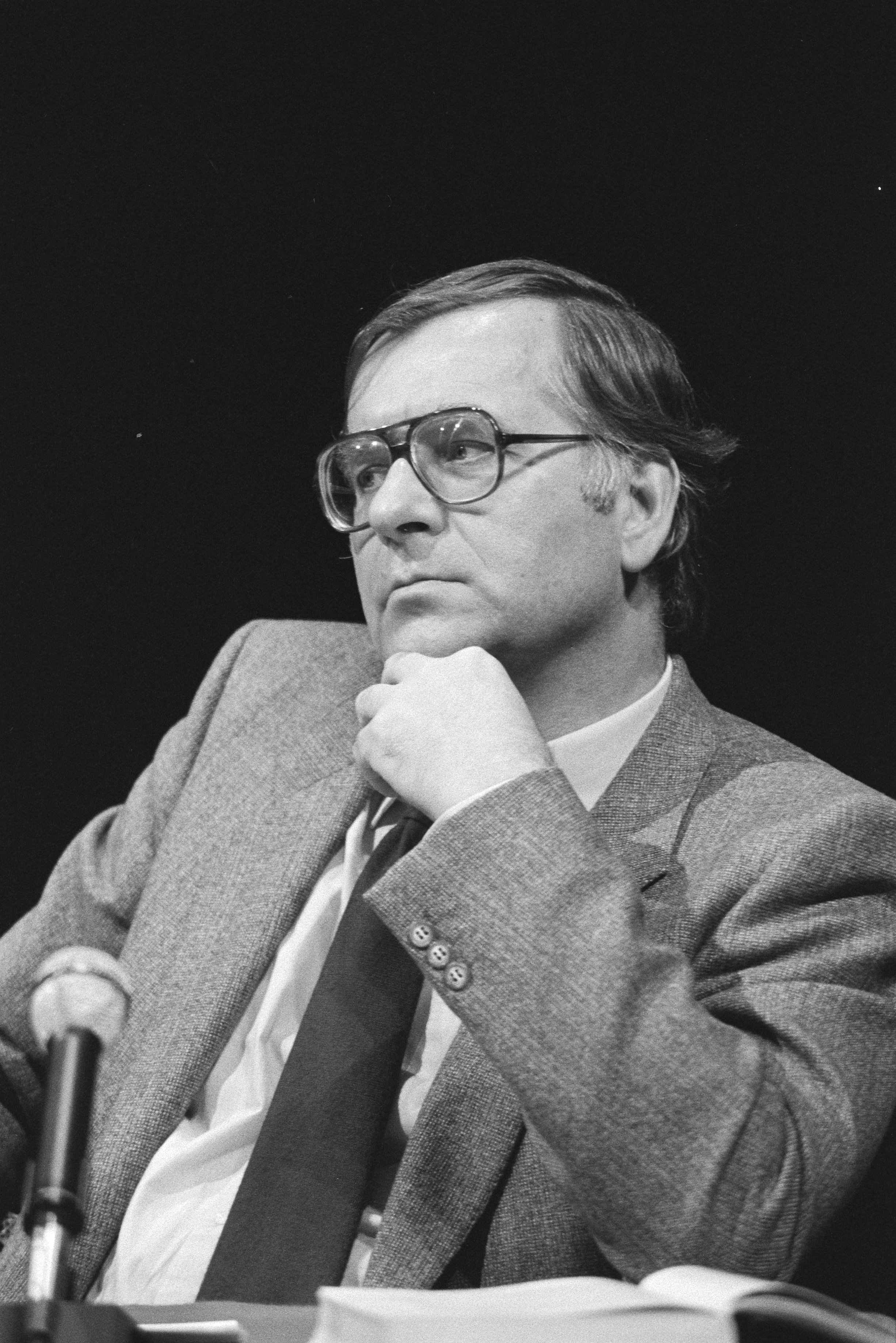 Collectie / Archief : Fotocollectie Anefo Reportage / Serie : [ onbekend ] Beschrijving : Huub Oosterhuis Annotatie : Randnummers negatiefstrook: nr. 16, 17 Theun de Vries Datum : 27 oktober 1982 Trefwoorden : dichters, portretten, priesters, theologen Persoonsnaam : Oosterhuis, Huub Fotograaf : Antonisse, Marcel / Anefo Auteursrechthebbende : Nationaal Archief Materiaalsoort : Negatief (zwart/wit) Nummer archiefinventaris : bekijk toegang 2.24.01.05 Bestanddeelnummer : 932-3754